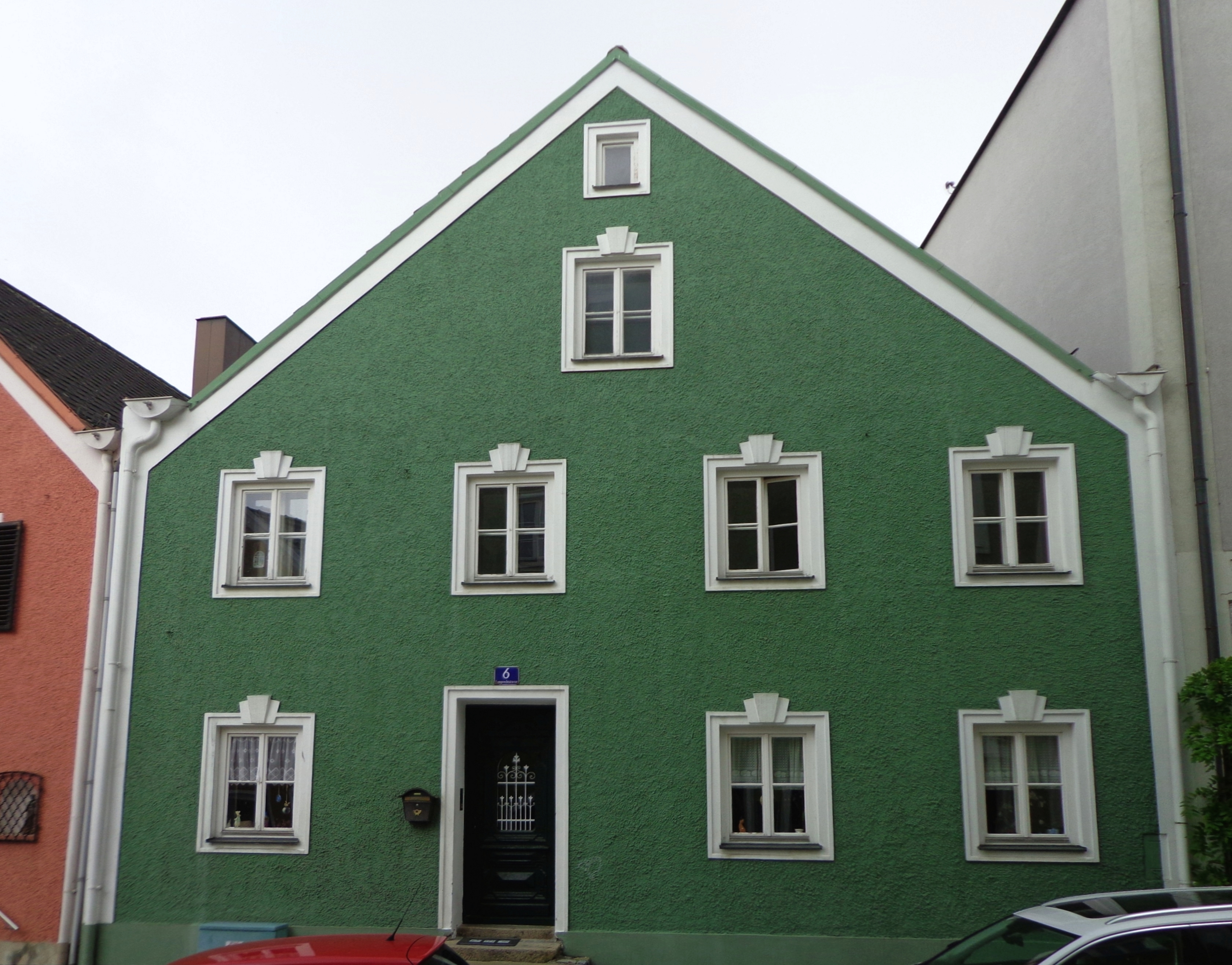 Schärding, altes Bürgerhaus "Weberhaus" Lamprechtstraße 6 (Hausnummer im Jahre 1805: Nr. 84; im Jahre 1851: Nr. 88)